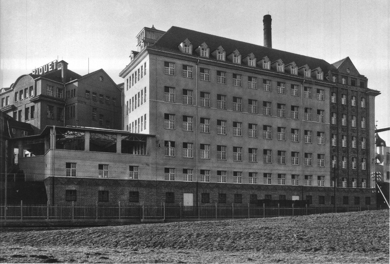 Gebäude der Schokoladenfabrik Riquet & Co. in Markkleeberg-Gautzsch, Koburger Straße 13 Die Aktiengesellschaft Riquet & Co. wurde 1905 gegründet und handelte mit Produkten aus China, Japan und dem Orient. Bekannt war sie in erster Linie für den Riquet-Tee, darüber hinaus durch Kakao, Schokolade und Waffeln aus eigener Produktion.